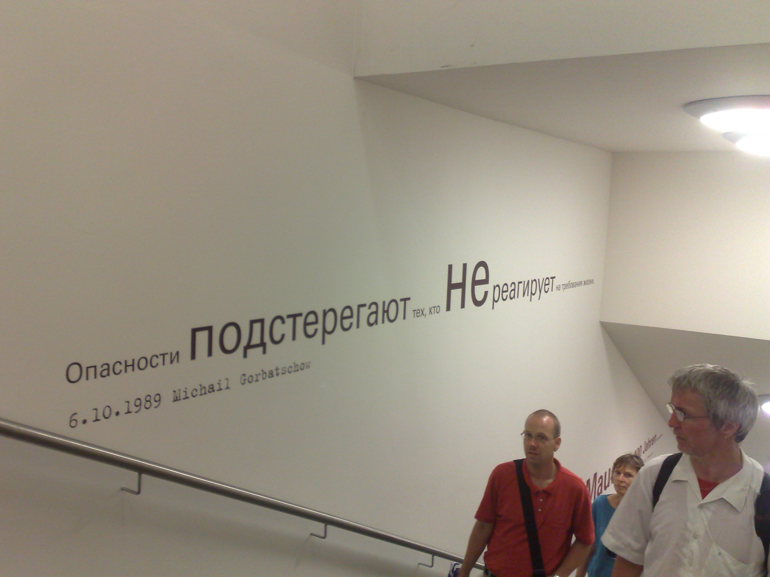 Inschrift im U-Bahnhof Brandenburger Tor, Berlin